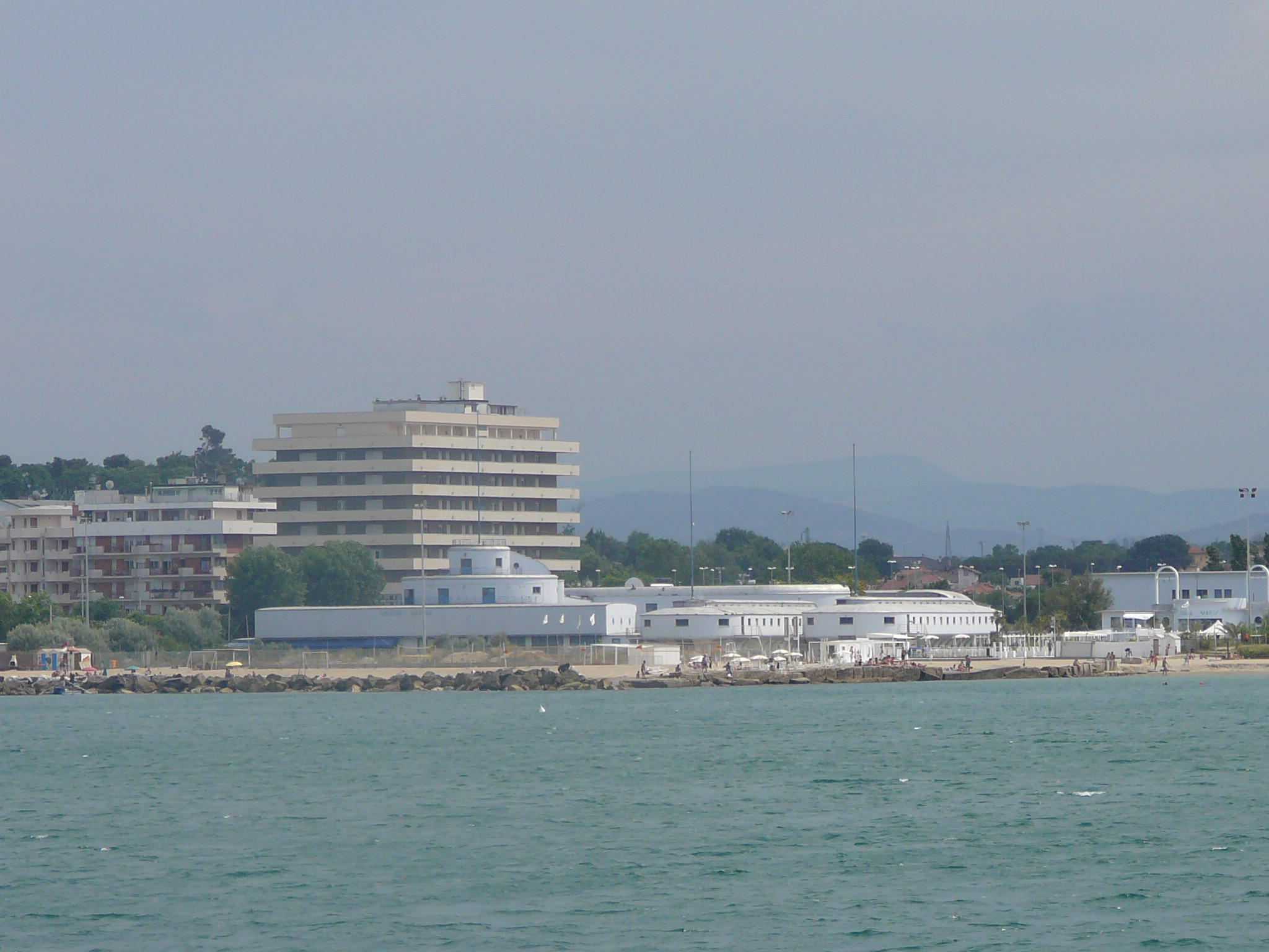 acquario navi a cattolica